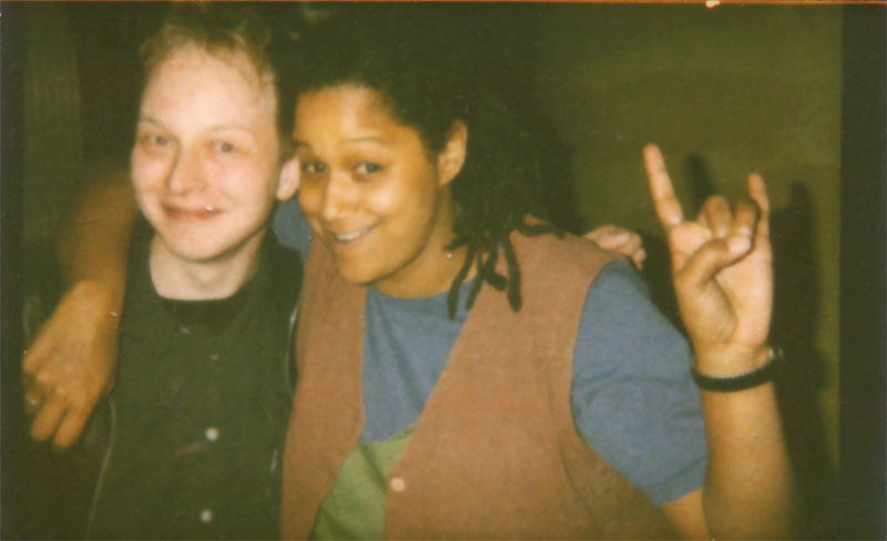 Doc Schoko (links) und Ebony Brown (rechts) am 19. April 2000 bei Radio Hochsee